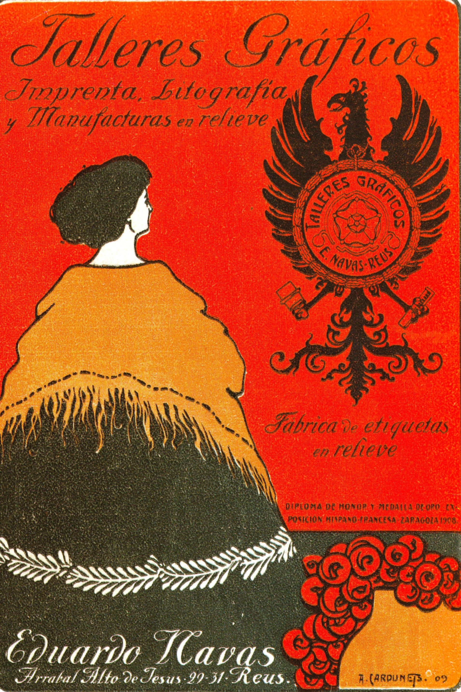 Anunci de la Impremta d'Eduard Navàs fet per Alexandre Cardunets el 1909.